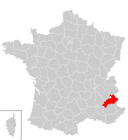 Localizacion dau departament deis auteis-Aups en França.